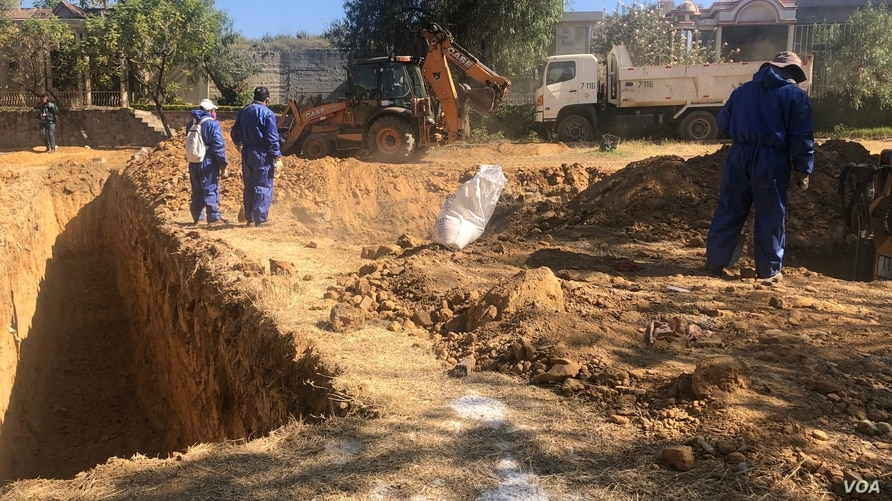 Fosas comunes en Cochabamba para los fallecidos por COVID-19